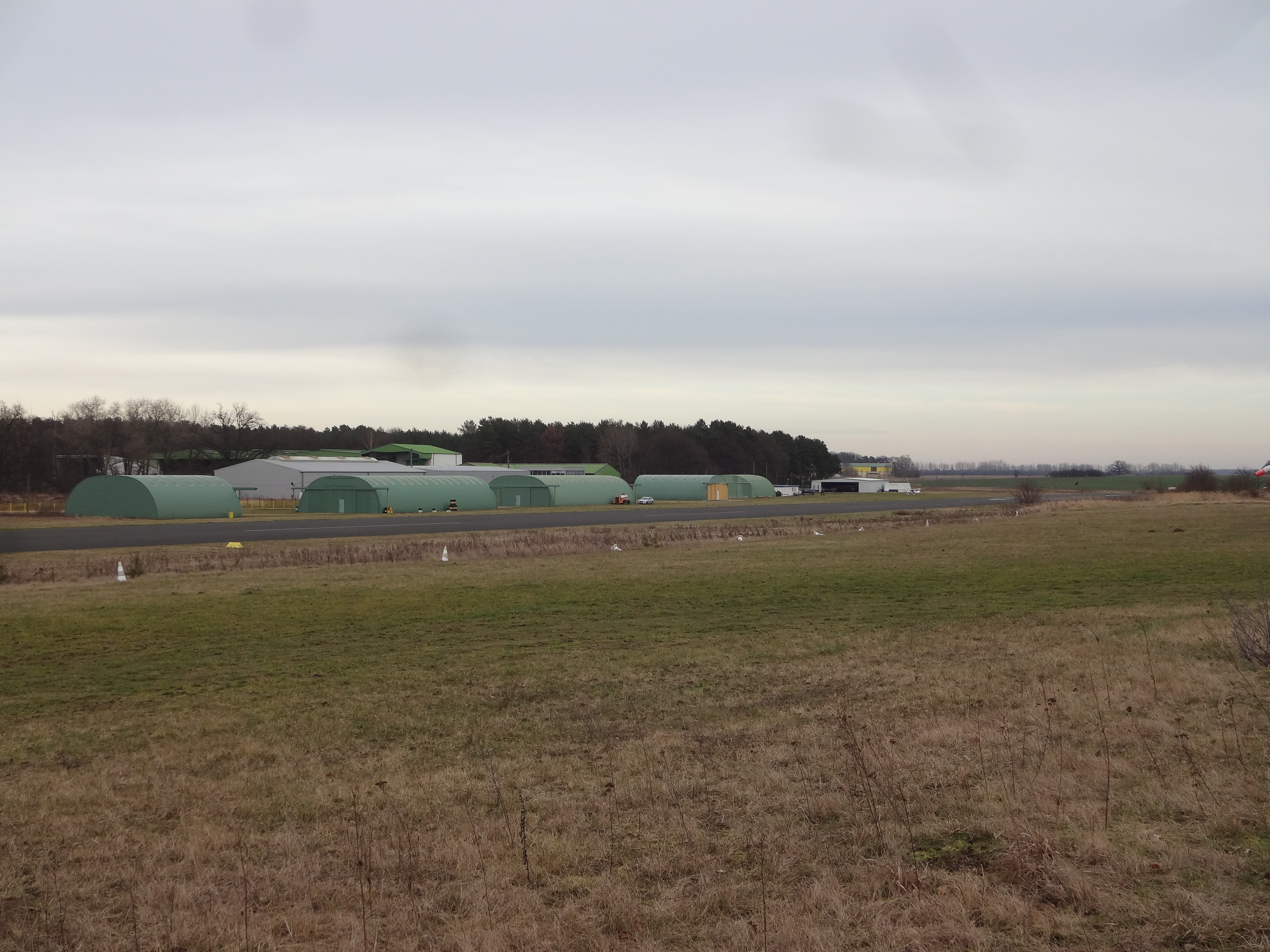 Flugplatz Ruppiner Land, ab 2018 "Flugplatz Fehrbellin"